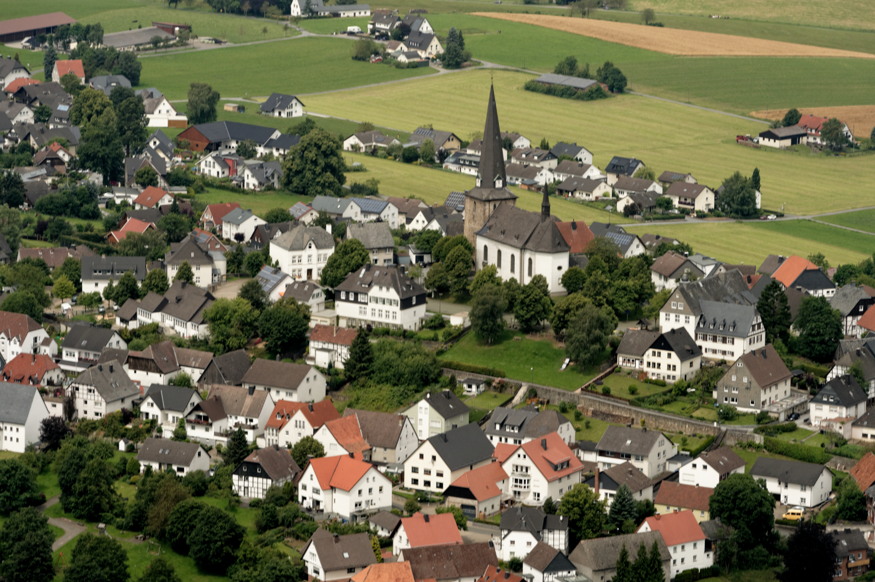 Fotoflug Sauerland Nord. Rüthen-Kallenhardt, Pfarrkirche St. Clemens, Blickrichtung Nord The making of this document was supported by the Community-Budget of Wikimedia Germany.